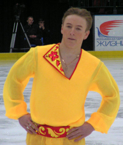 Sergei Slawnow während der Russischen Meisterschaften 2005